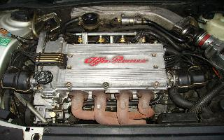 Gabriele